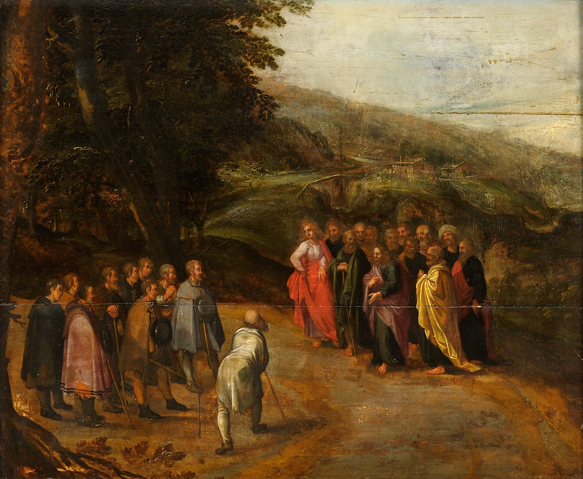 Jesus sanat decem (Jesus heilt die Zehn)